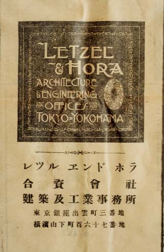 Folleto publicitario del estudio de arquitectura de Jan Letzel y Karl Horan